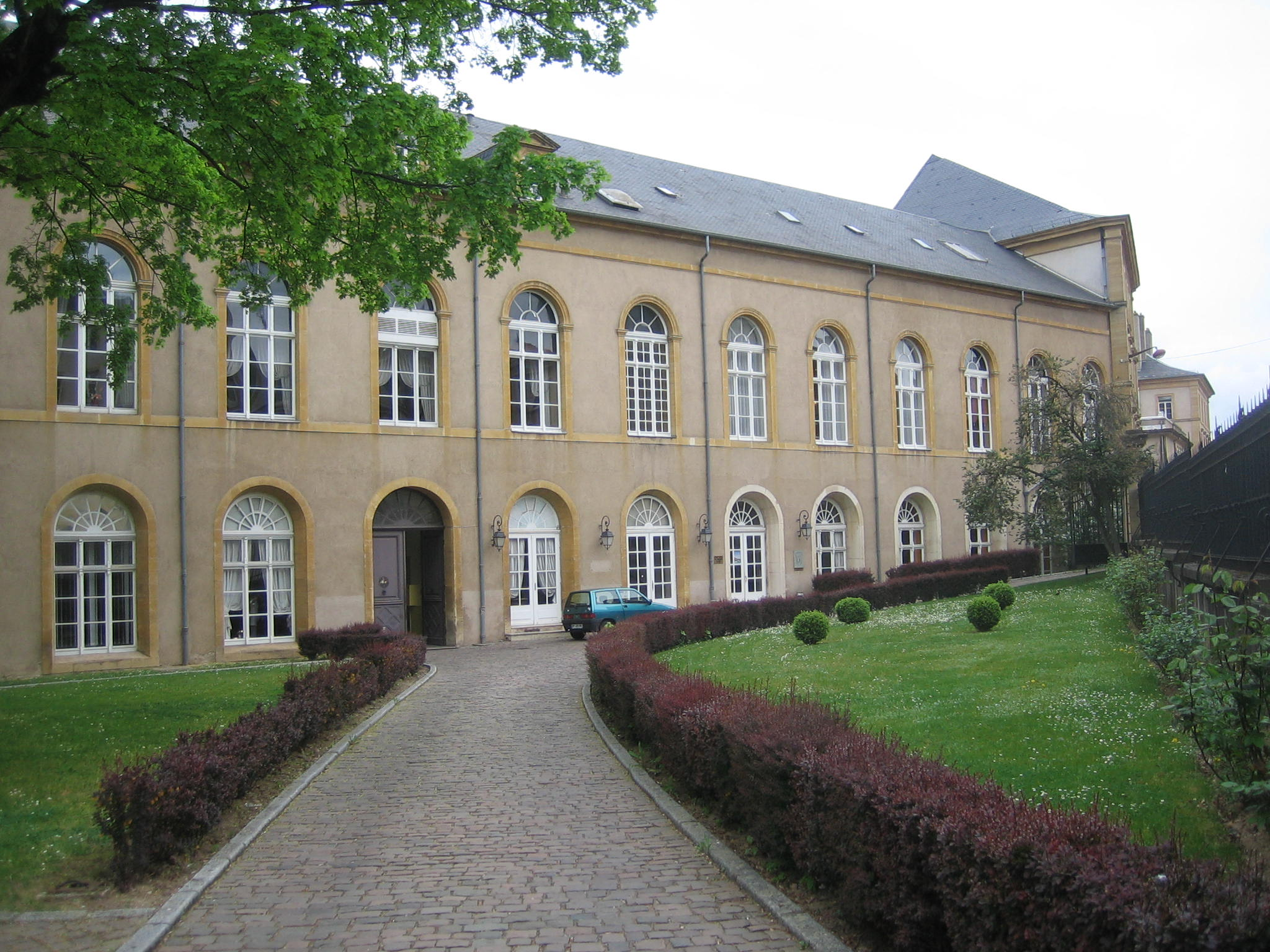 École d'application de l'artillerie et du génie à Metz (1802-1870); aujourd'hui cercle des officiers. Abbaye de Saint-Arnould